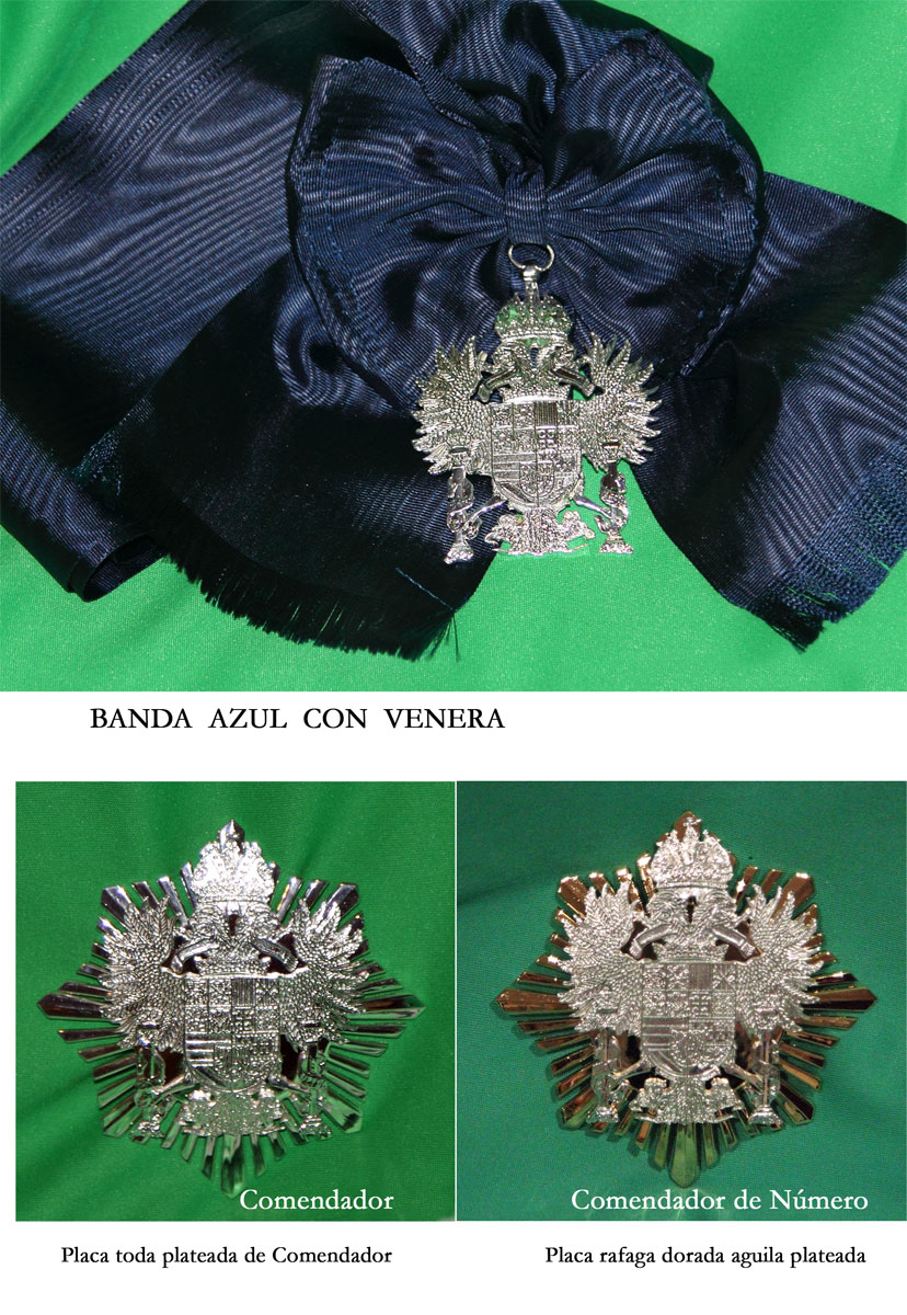 Banda y placa